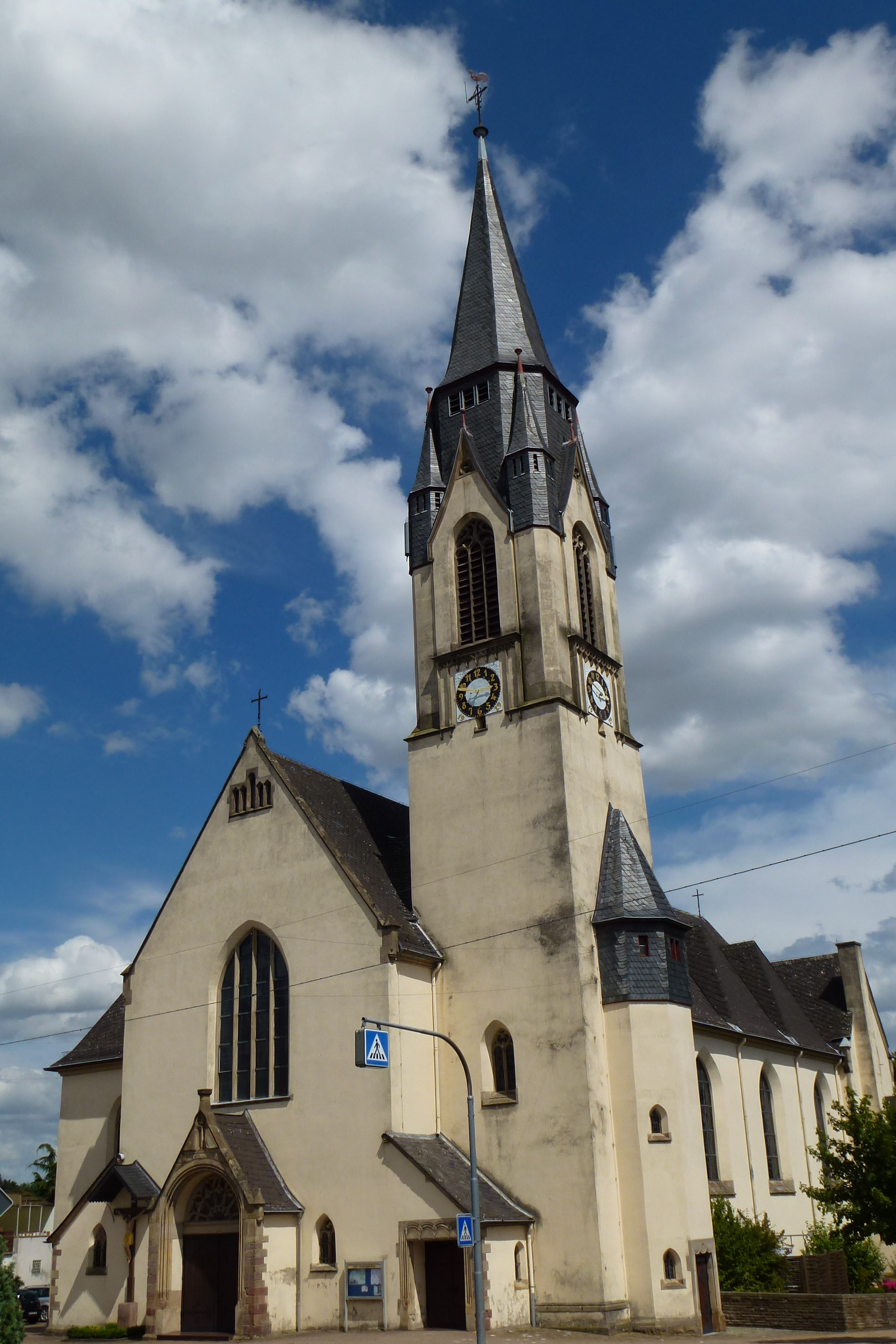 Frontansicht.